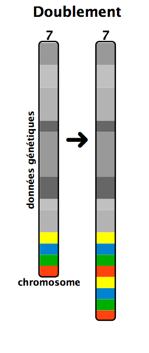 chromosome, doublement, duplication, mutation génétique, mue génétique, gène